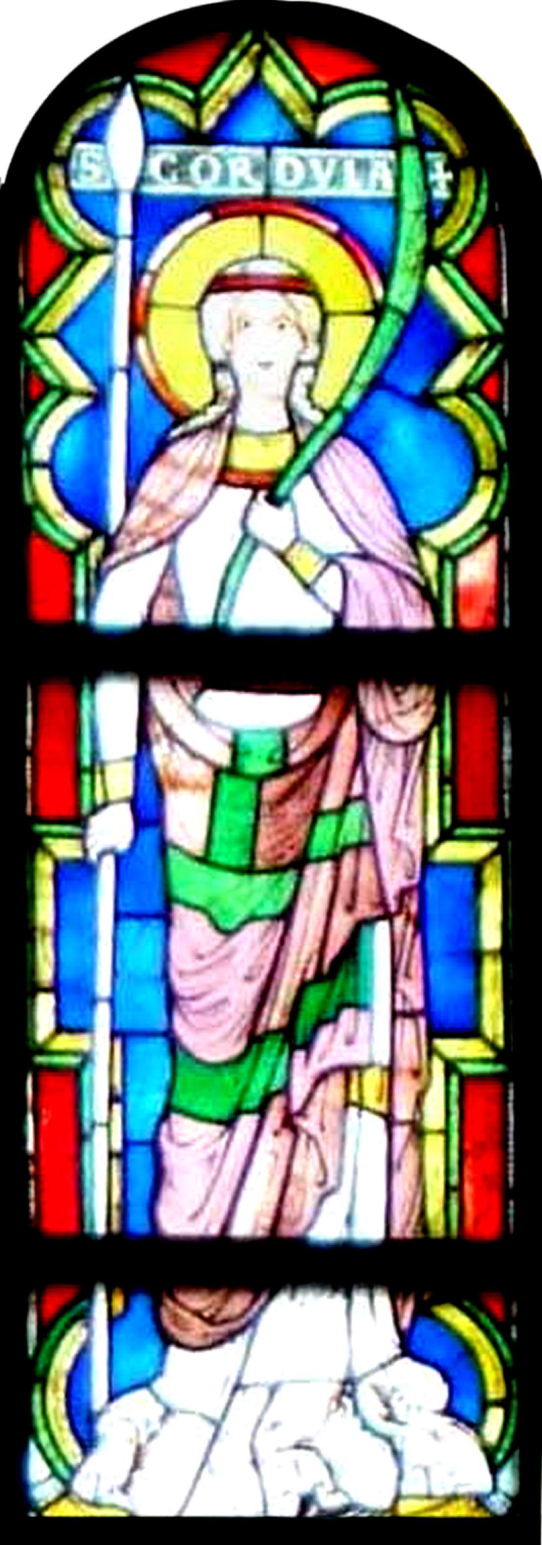 Aelteste bekannte Darstellung der Heiligen Cordula von 1220 im Glasfenster der St. Kunibert-Kirche in Köln